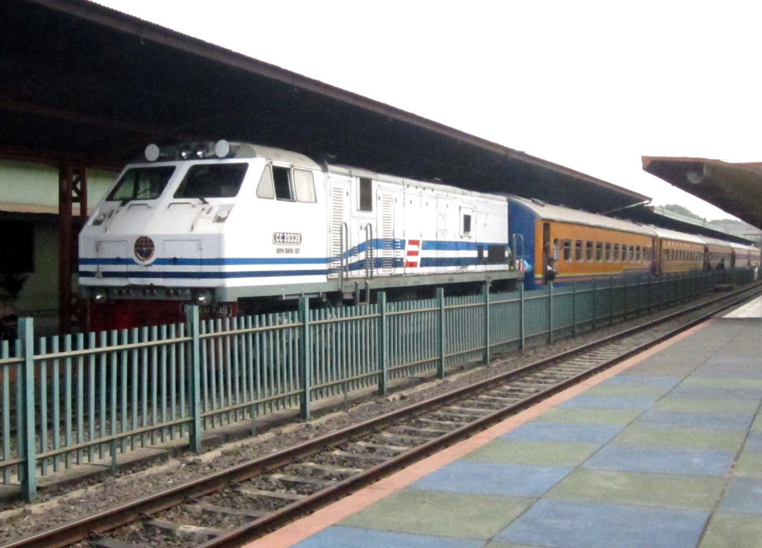 KA Penataran singgah di Stasiun Malang.